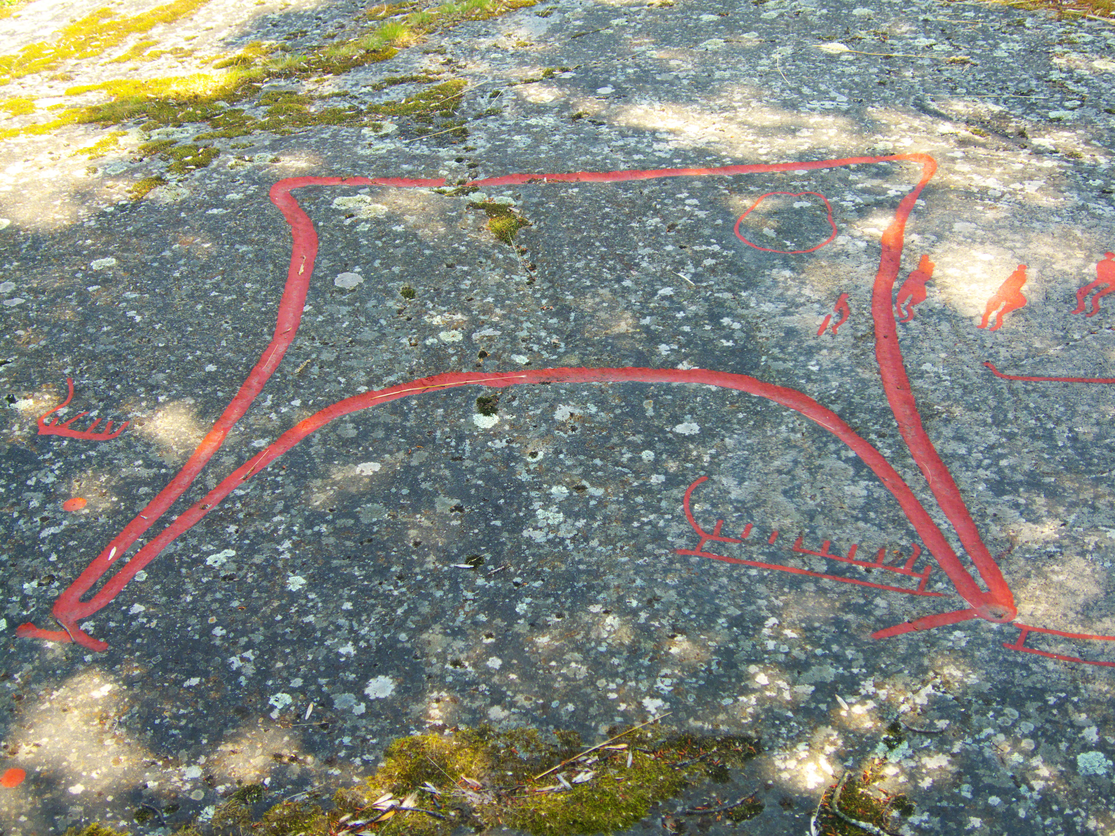 "Rickebystolen", avbildning av livklädnad, Stora Rickebyhällen, Boglösa socken